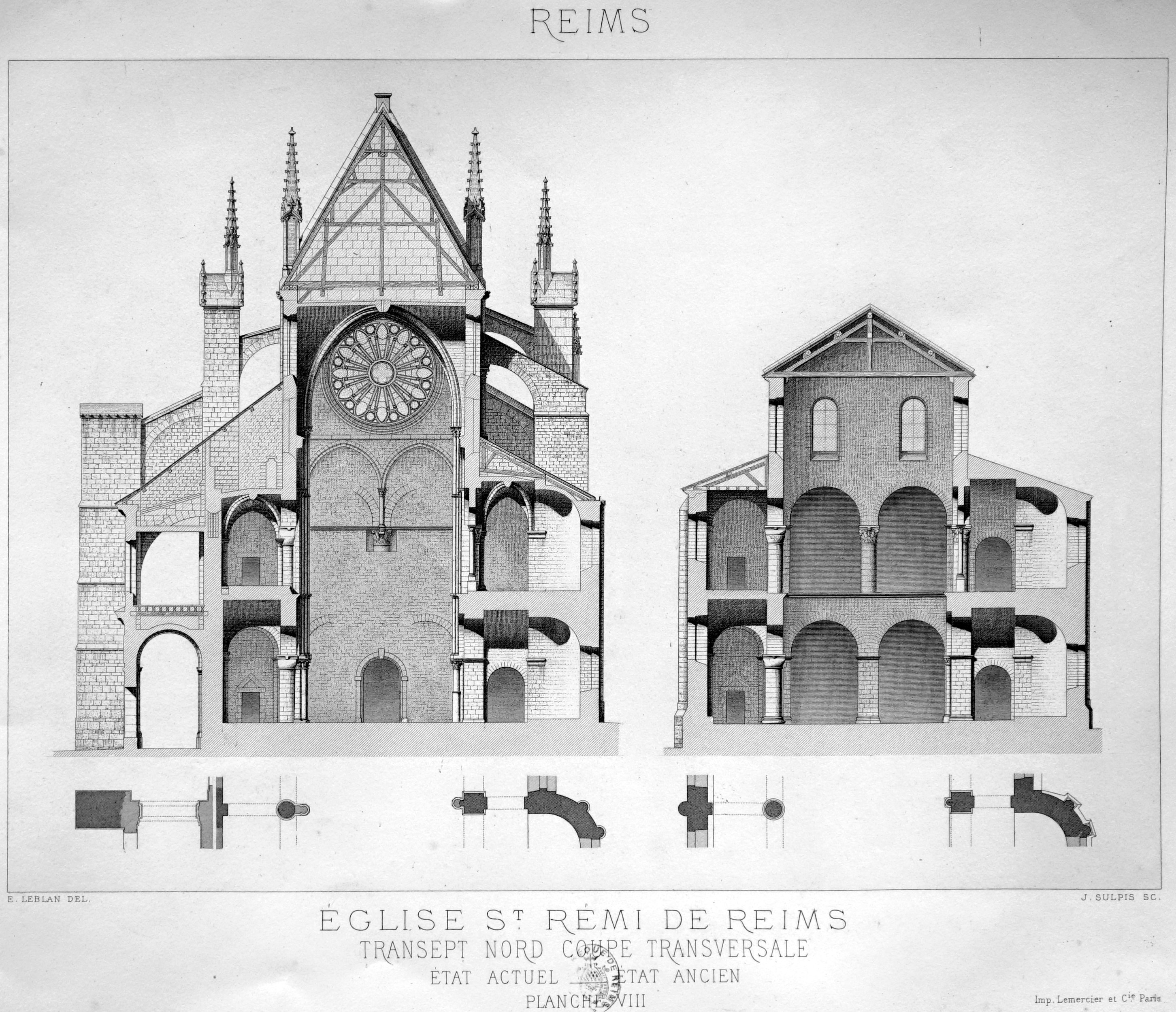 extrait de "Architecture, histoire. Les monuments historiques de la ville de Reims / par Eugène Leblan, architecte, avec la collaboration, pour le texte: de MM. Louis Paris, Cauly, Ch. Givelet, H. Jadart, Louis Demaison, et pour la gravure: de MM. R. Pfnor, Sulpis, Soudain, et des meilleurs artistes contemporains".